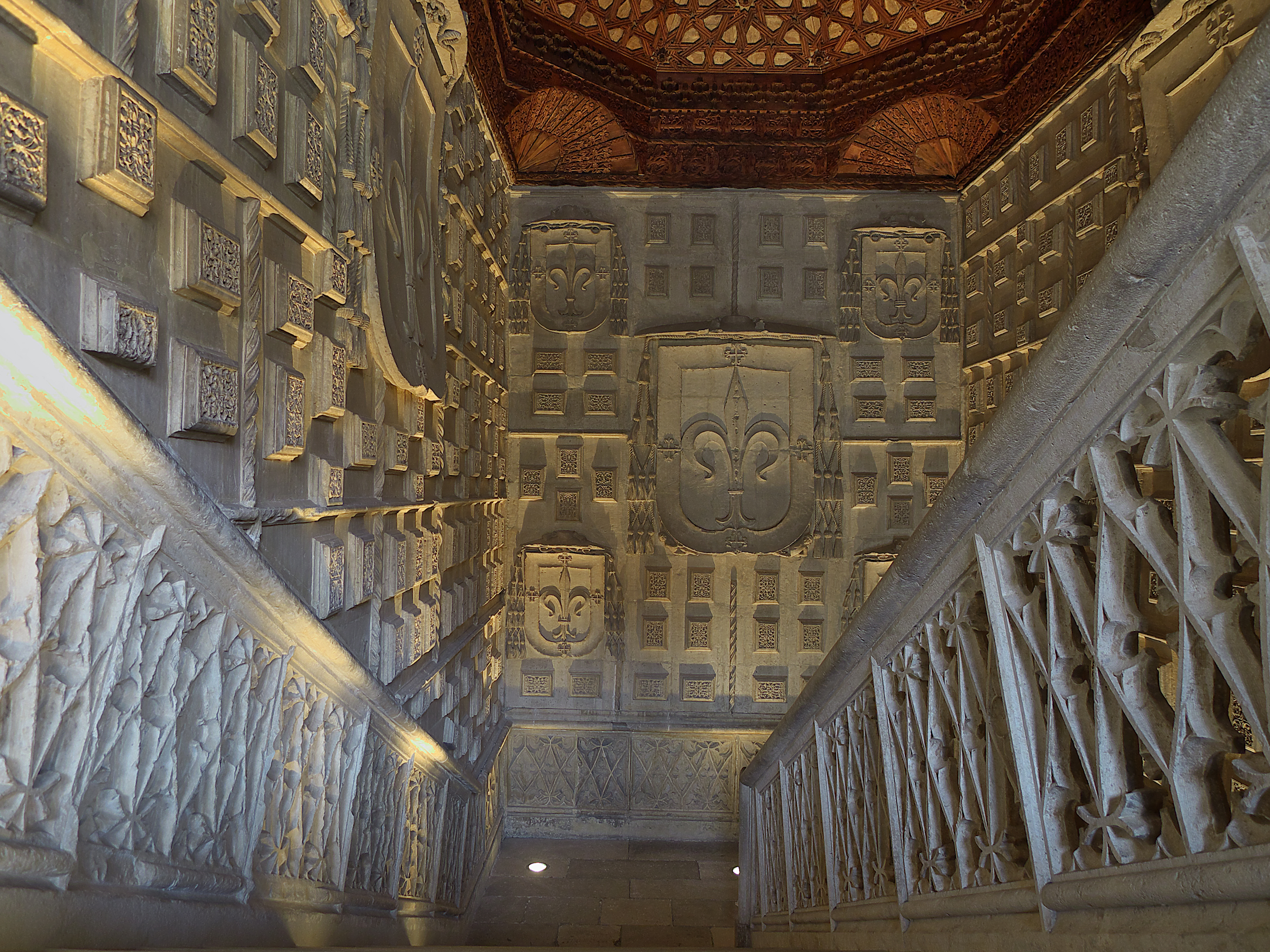 Escalera de comunicación de las plantas del patio. Primorosamente ejecutada empleando tres estilos artísticos, el gótico, mudéjar y renacentista.